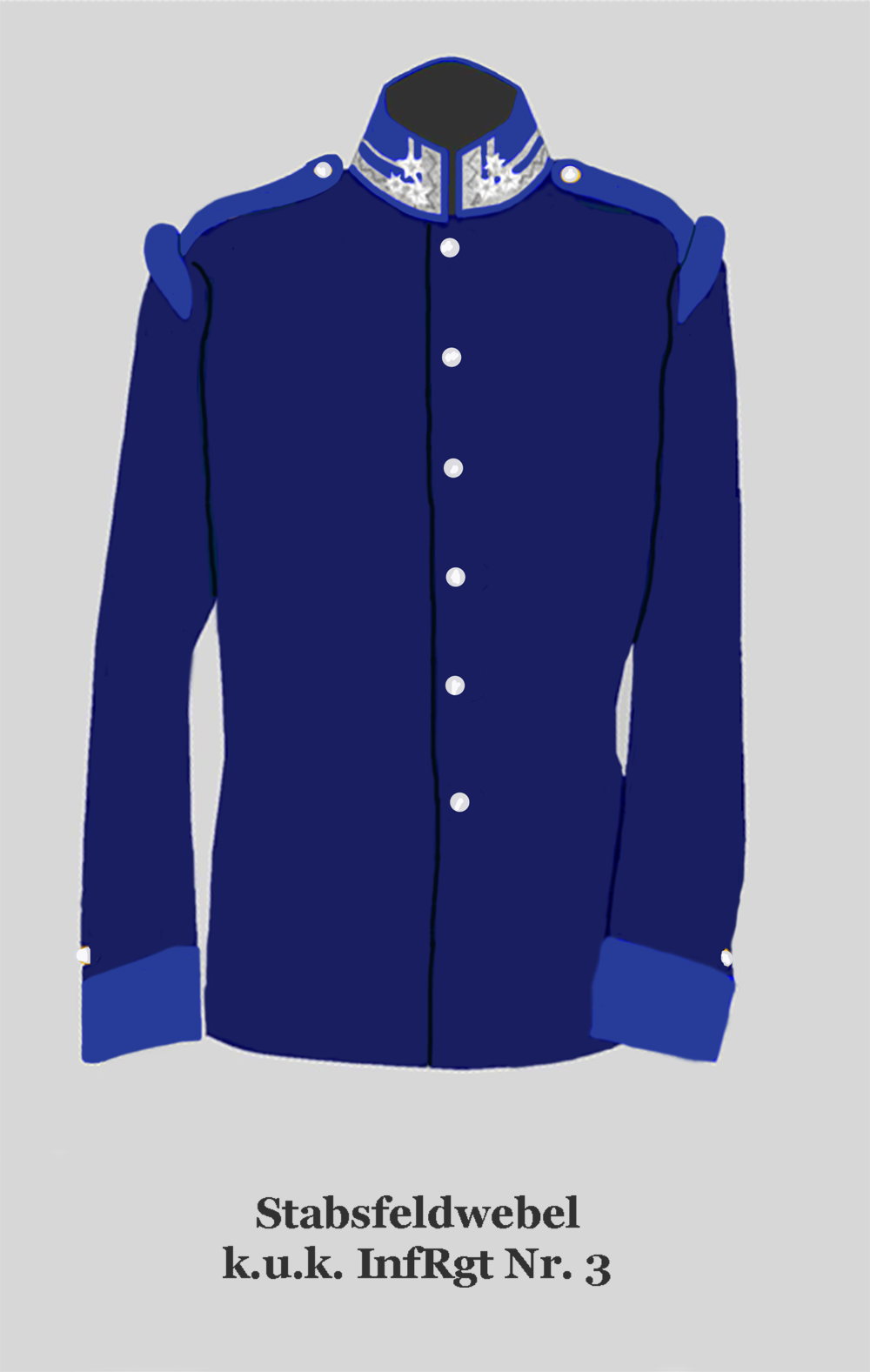 Waffenrock eines Stabsfeldwebel k.u.k. Inf Rgt Nr. 3